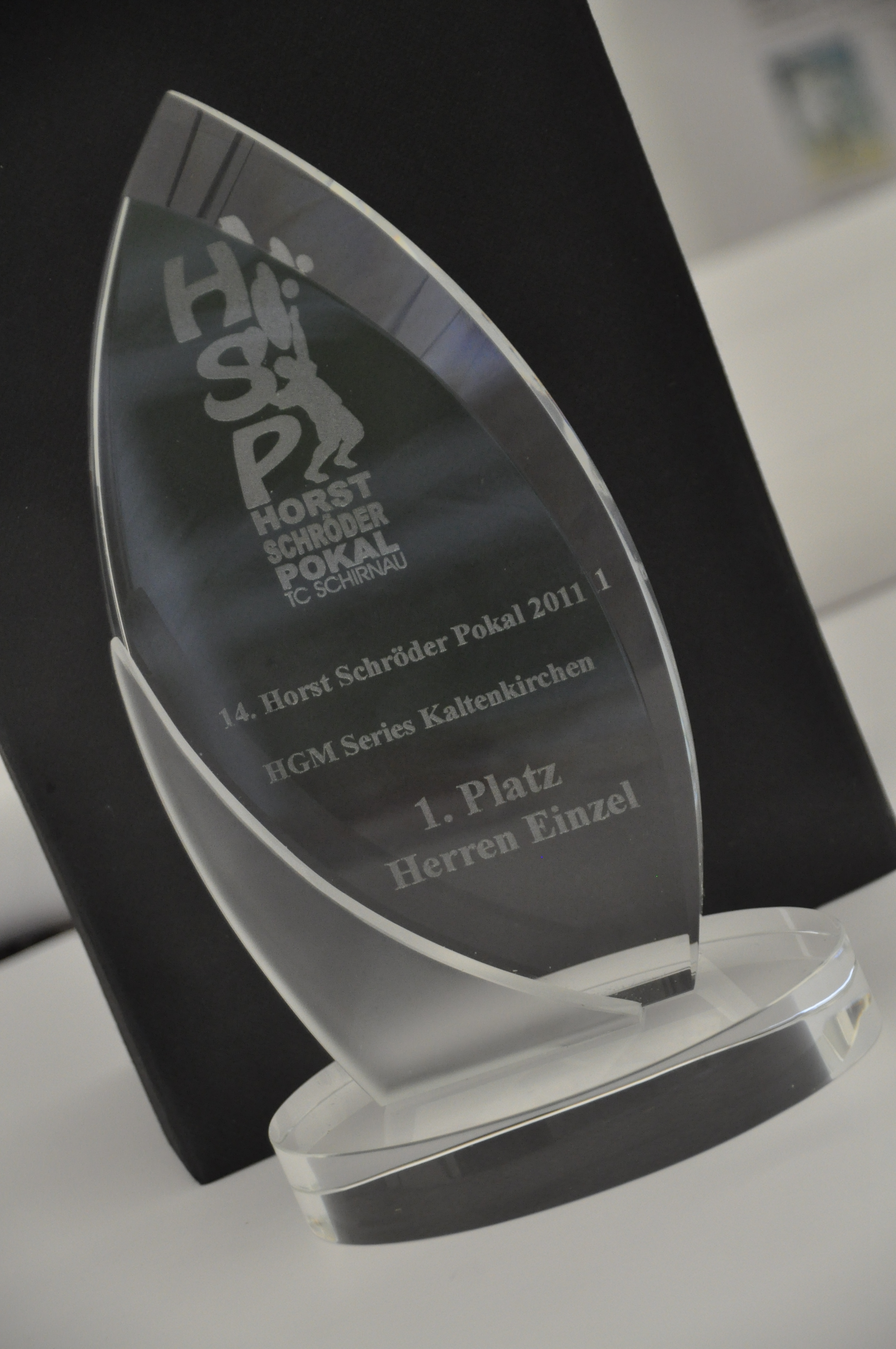 Tennis Glaspokal Trophäe Herren Horst Schröder Pokal 2011